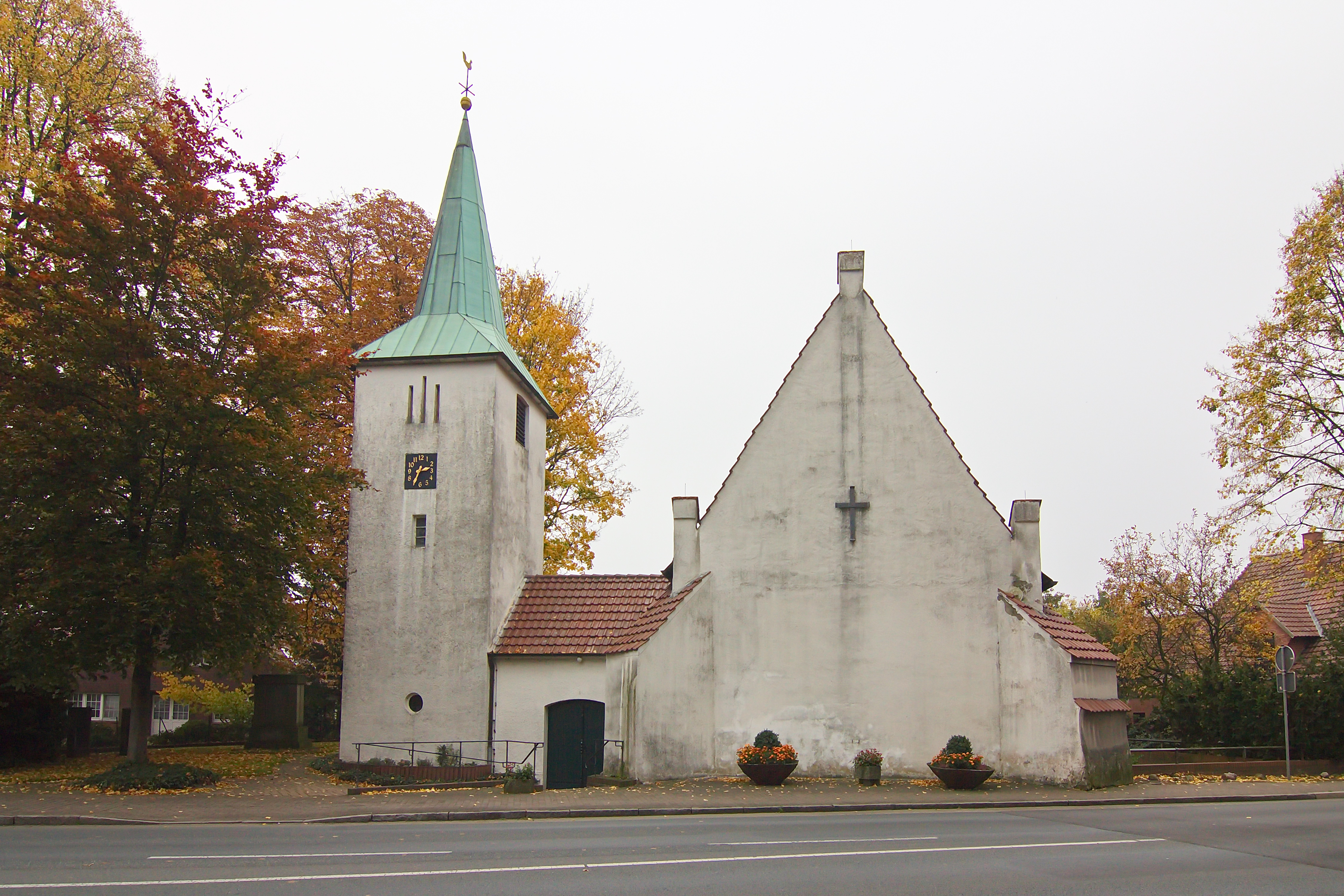 Die Dorfkirche "Zum heiligen Kreuz" in Barenburg stammt aus der Mitte des 15. Jahrhunderts und wurde auf einer Vorgänger-Kapelle von 1200 errichtet.